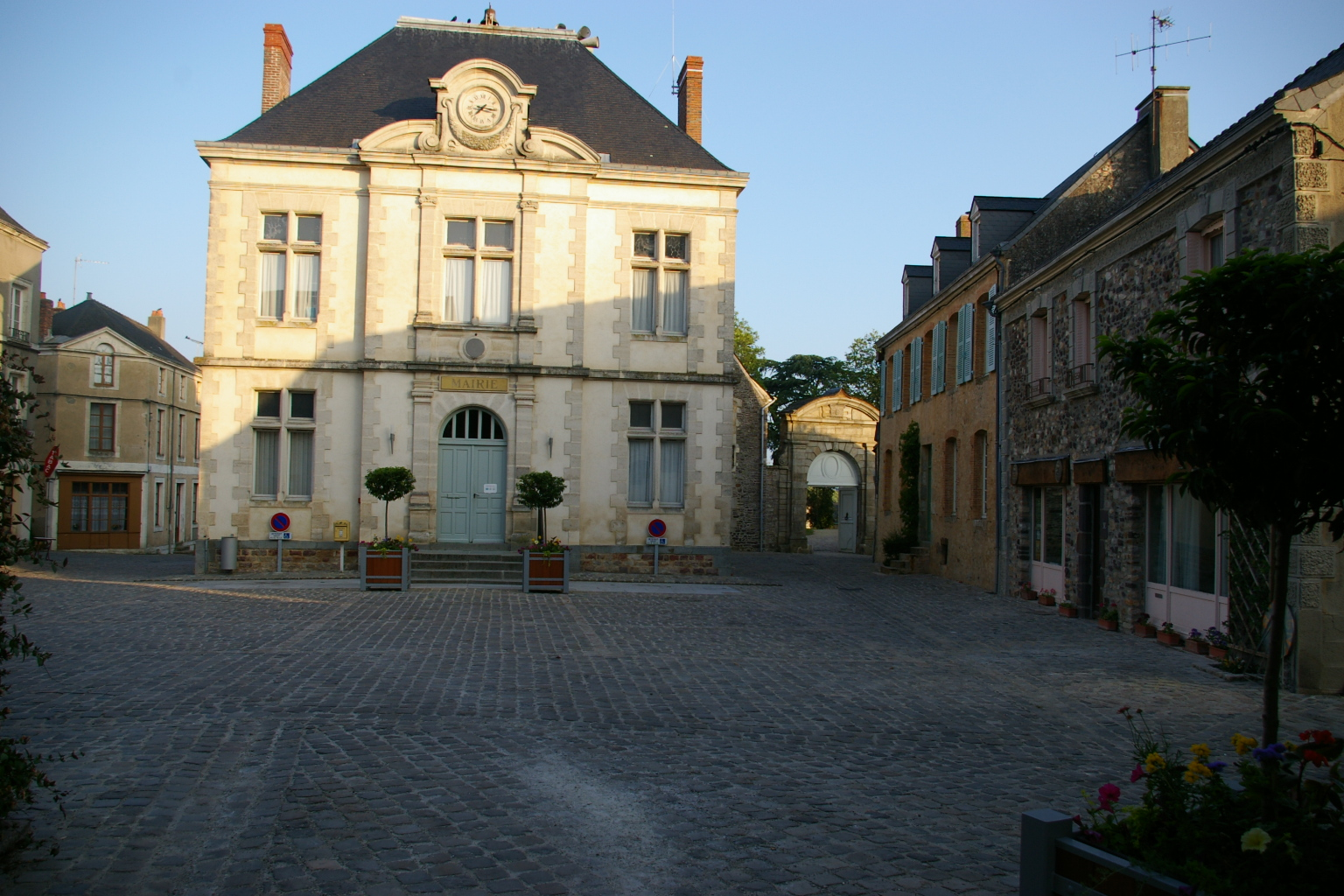 Place Hubert II à Sainte-Suzanne (53)